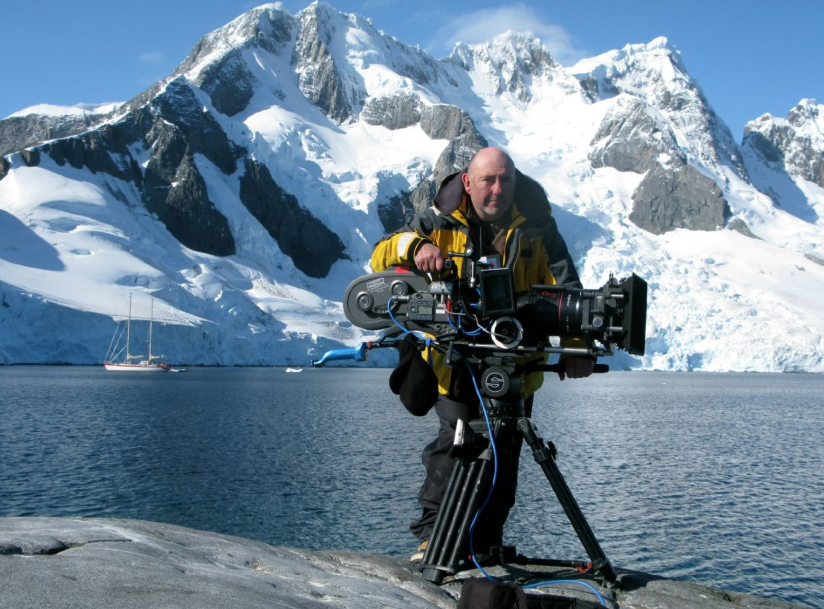 Antarctica